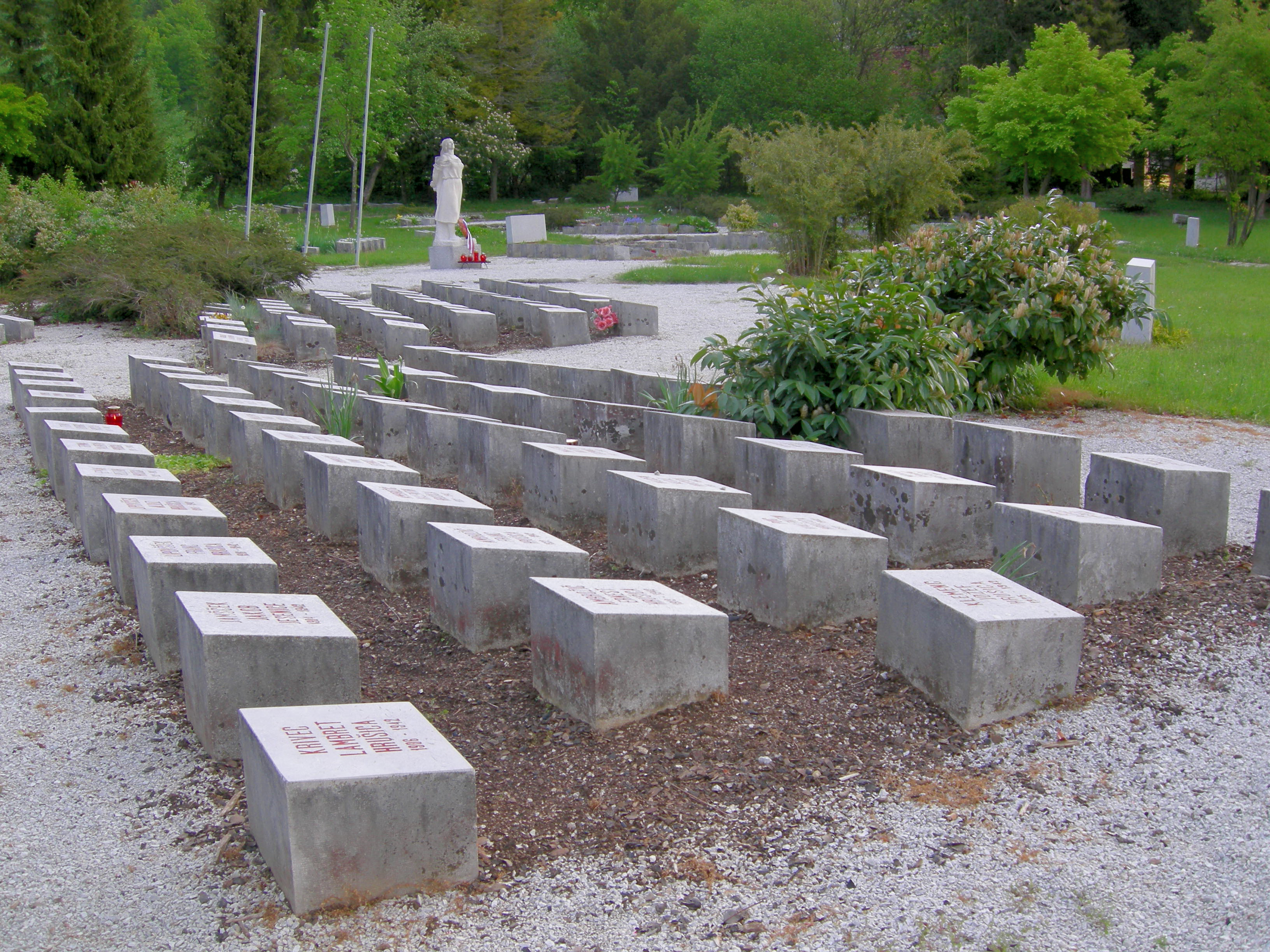 Grobišče talcev v gradu Kacenštajn, Begunje na Gorenjskem, Slovenia